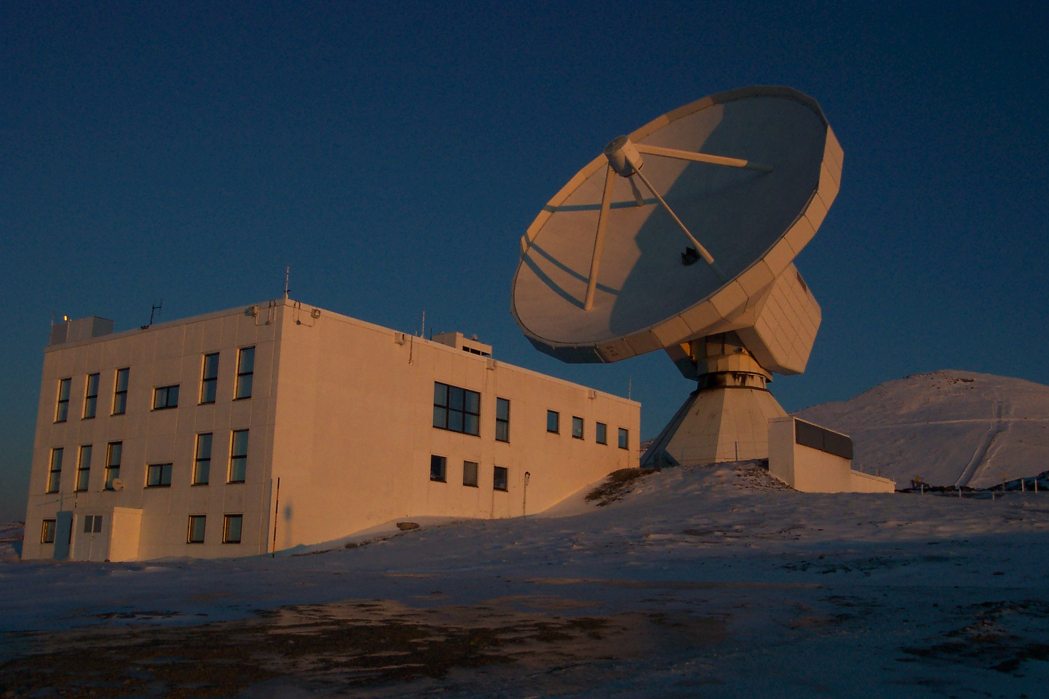 Vista general del Observatorio IRAM Pico Veleta. General view of the IRAM Pico Veleta Observatory.